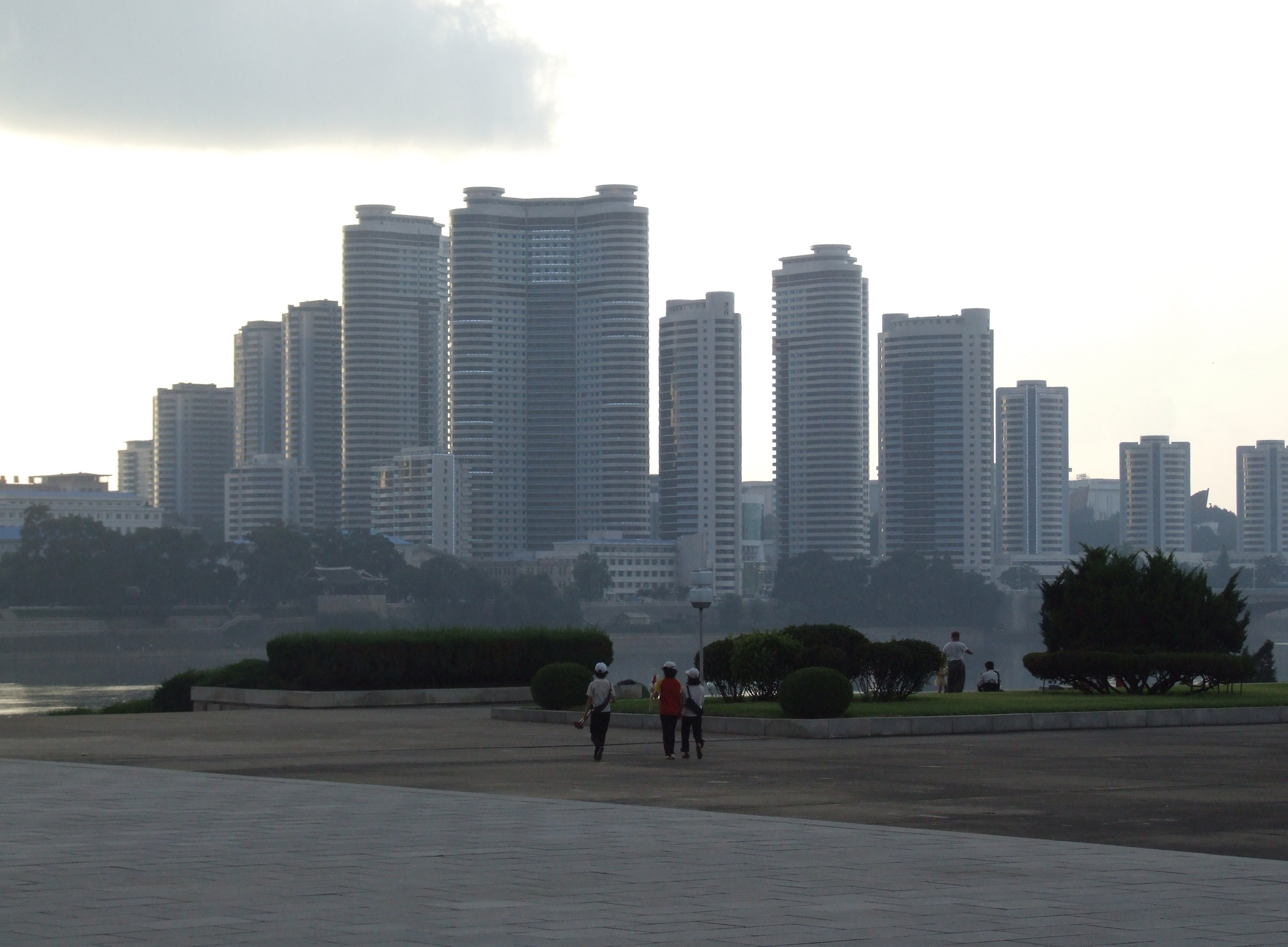 View from Juche Tower to the Changjon Street Apartment Complex